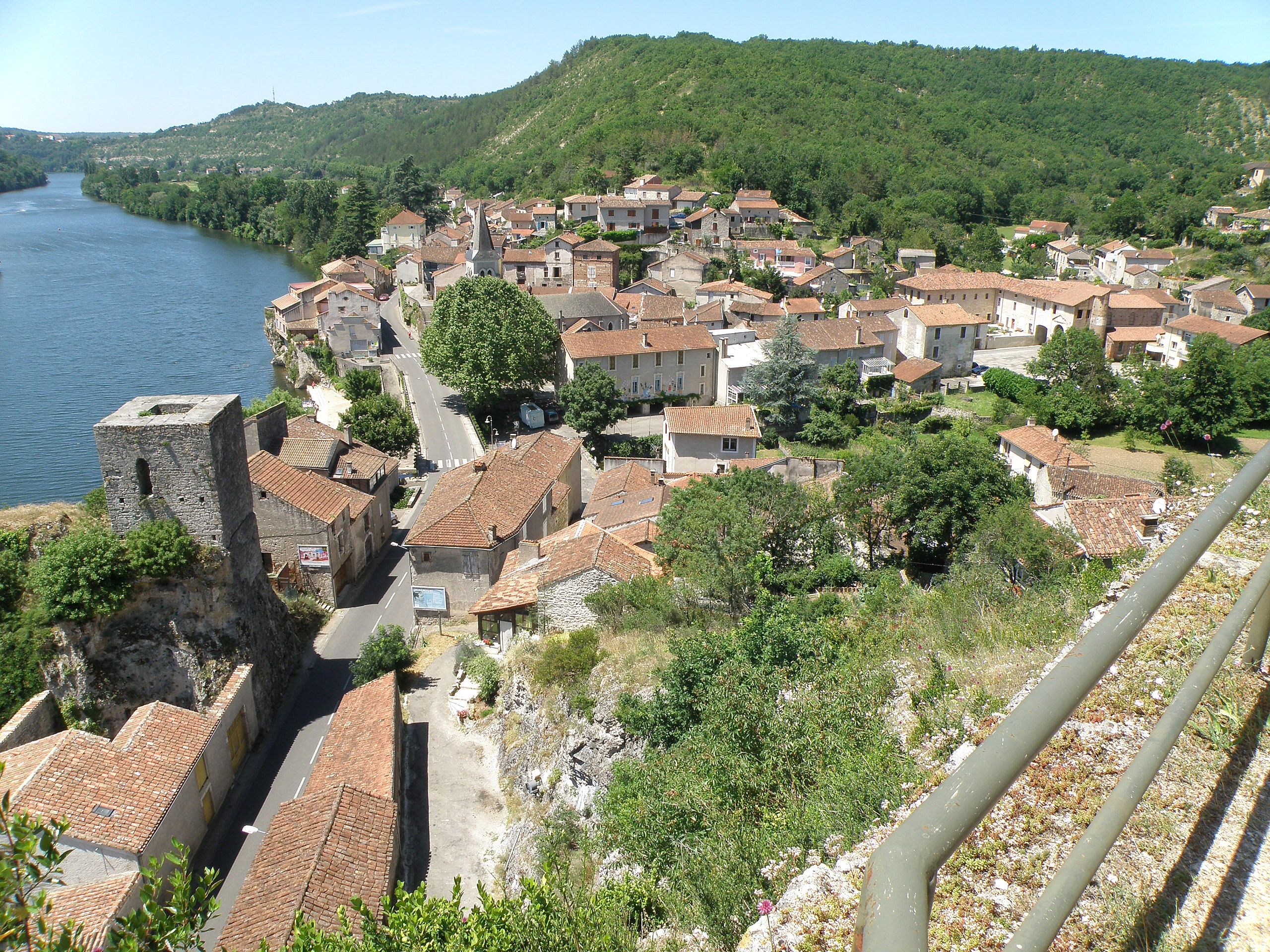 Laroque-des-Arcs, commune du Lot, France (région Midi-Pyrénées). Vue générale du bourg depuis la chapelle Saint-Roch. À gauche sur la photo : la rivière Lot, avec la masse grise et carrée de la tour de péage (XIIIe siècle). Coup d'oeil vers l'ouest-sud-ouest.